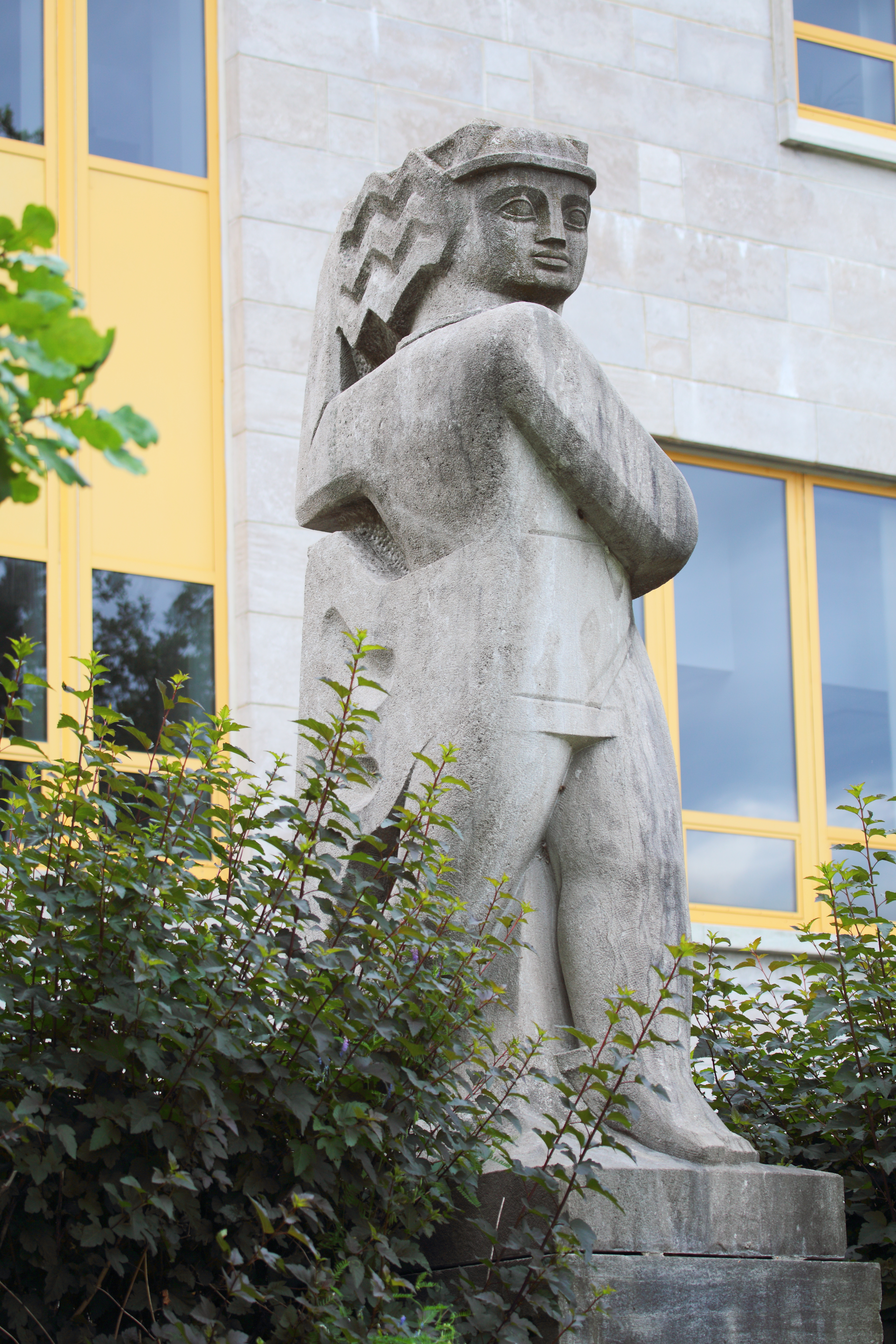 La sculpture représente Hermès, le dieu grec du commerce. Il est représenté comme un jeune homme debout, la tête de face, le corps de profil, les jambes de face et le pied gauche en avant. Il est accompagné de trois de ses attributs: il porte un casque et des sandales ailés et tient dans ses mains le caducée, c'est-à-dire un bâton ailé entouré de deux serpents, symbole du commerce.